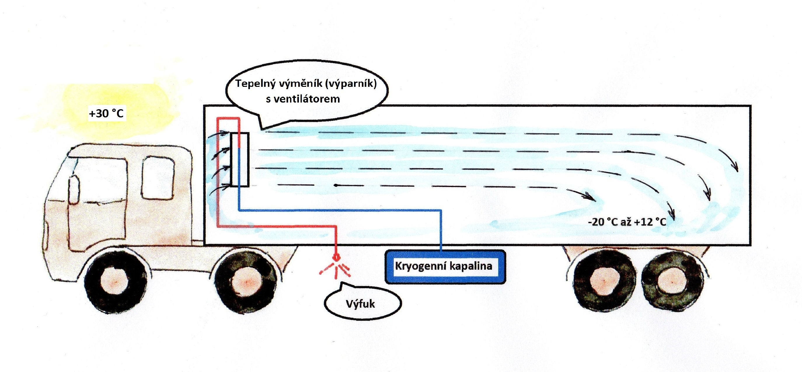 Kryogenní transportní jednotka - princip činnosti